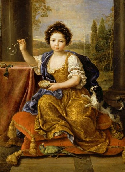 fille légitimée de Louis XIV et de la marquise de Montespan ; portrait posthume, dit La fillette aux bulles de savon